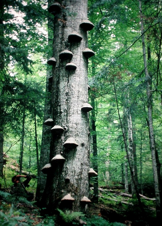 Kiszáradt bükkfán bükktapló